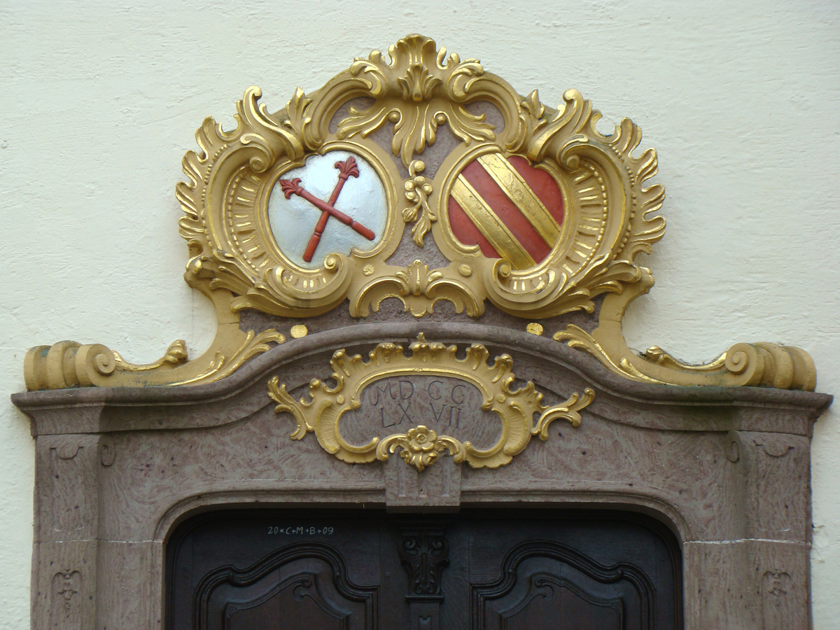 Portal von Schloss Eichtersheim in Angelbachtal-Eichtersheim